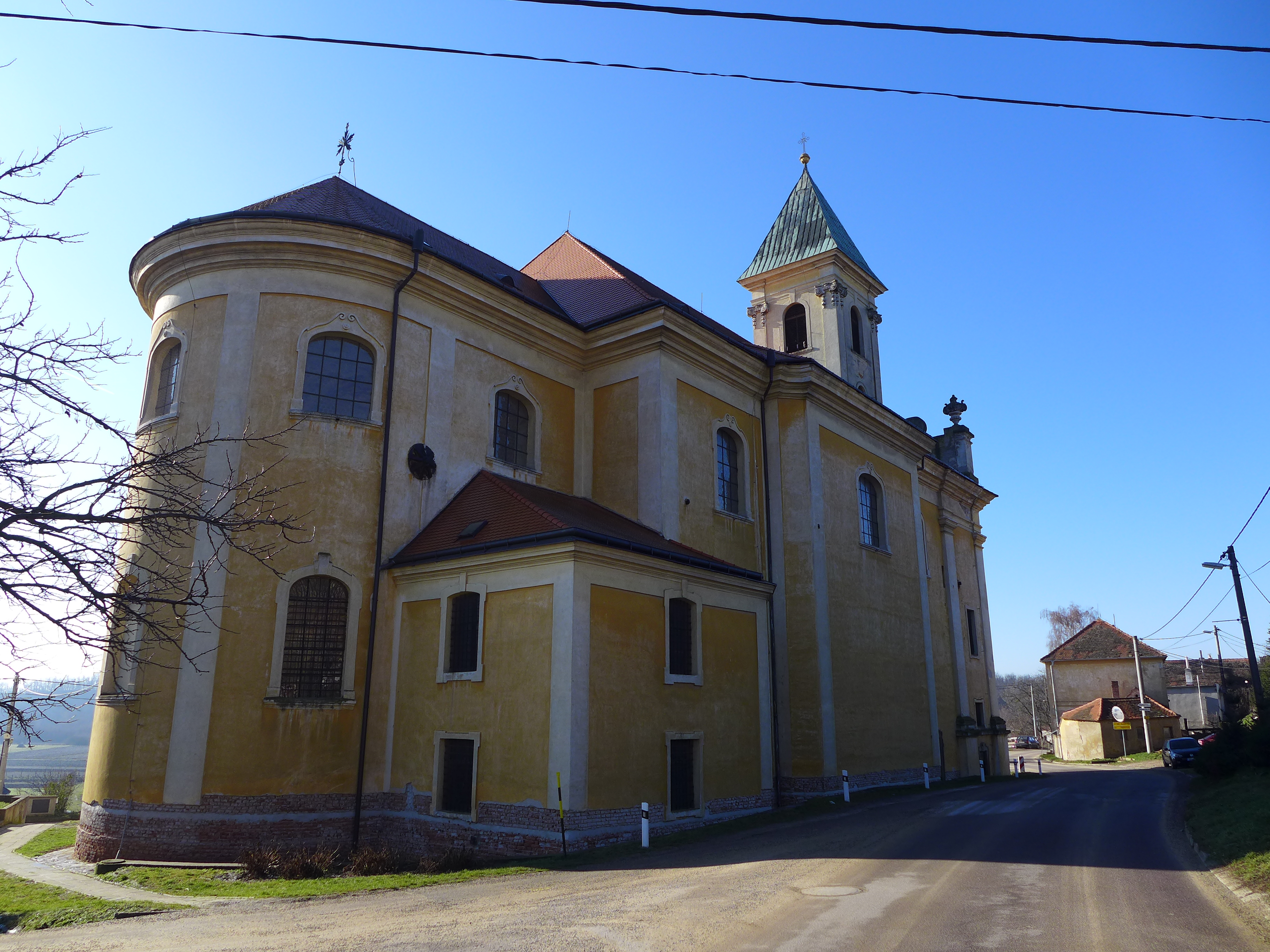 Kostel svatého Jana Nepomuckého, Dyje (okres Znojmo).